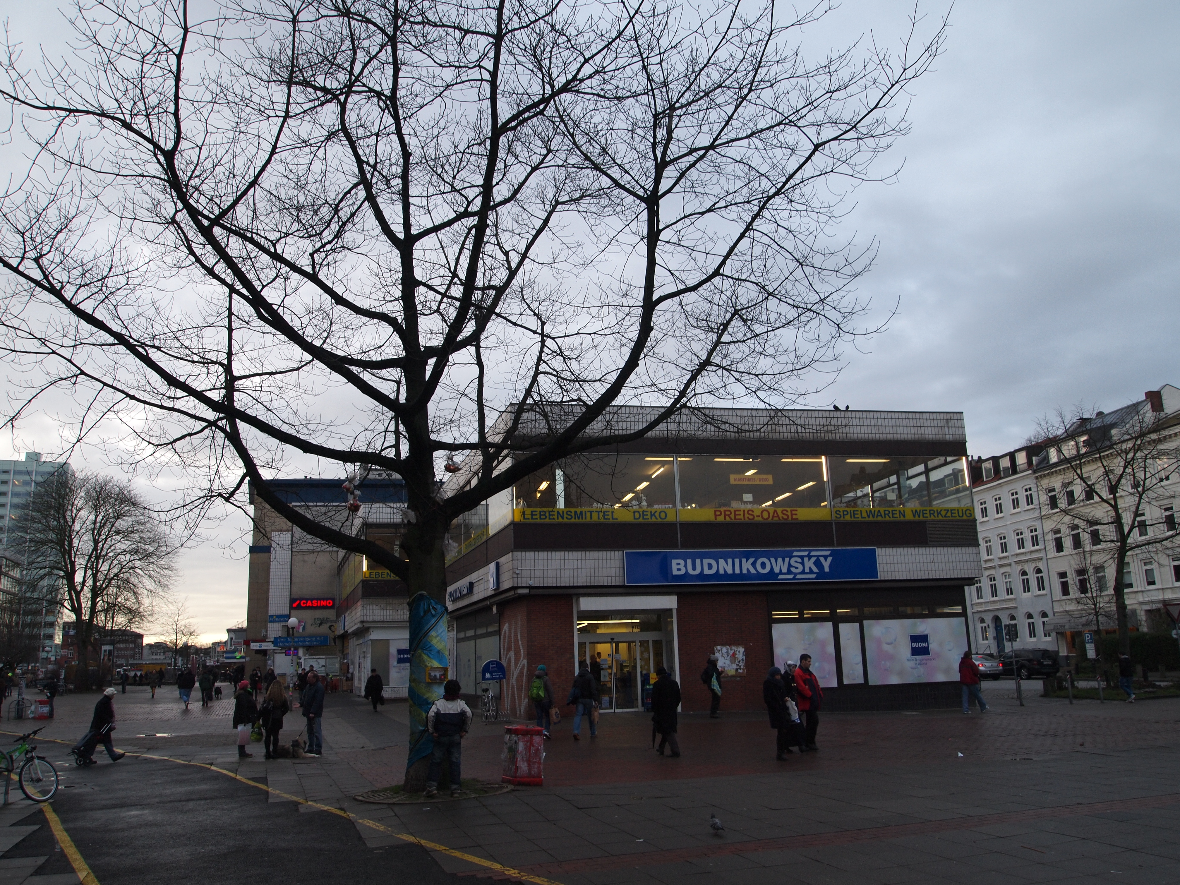 sogenannte bergspitze große bergstraße goetheplatz hamburg-altona